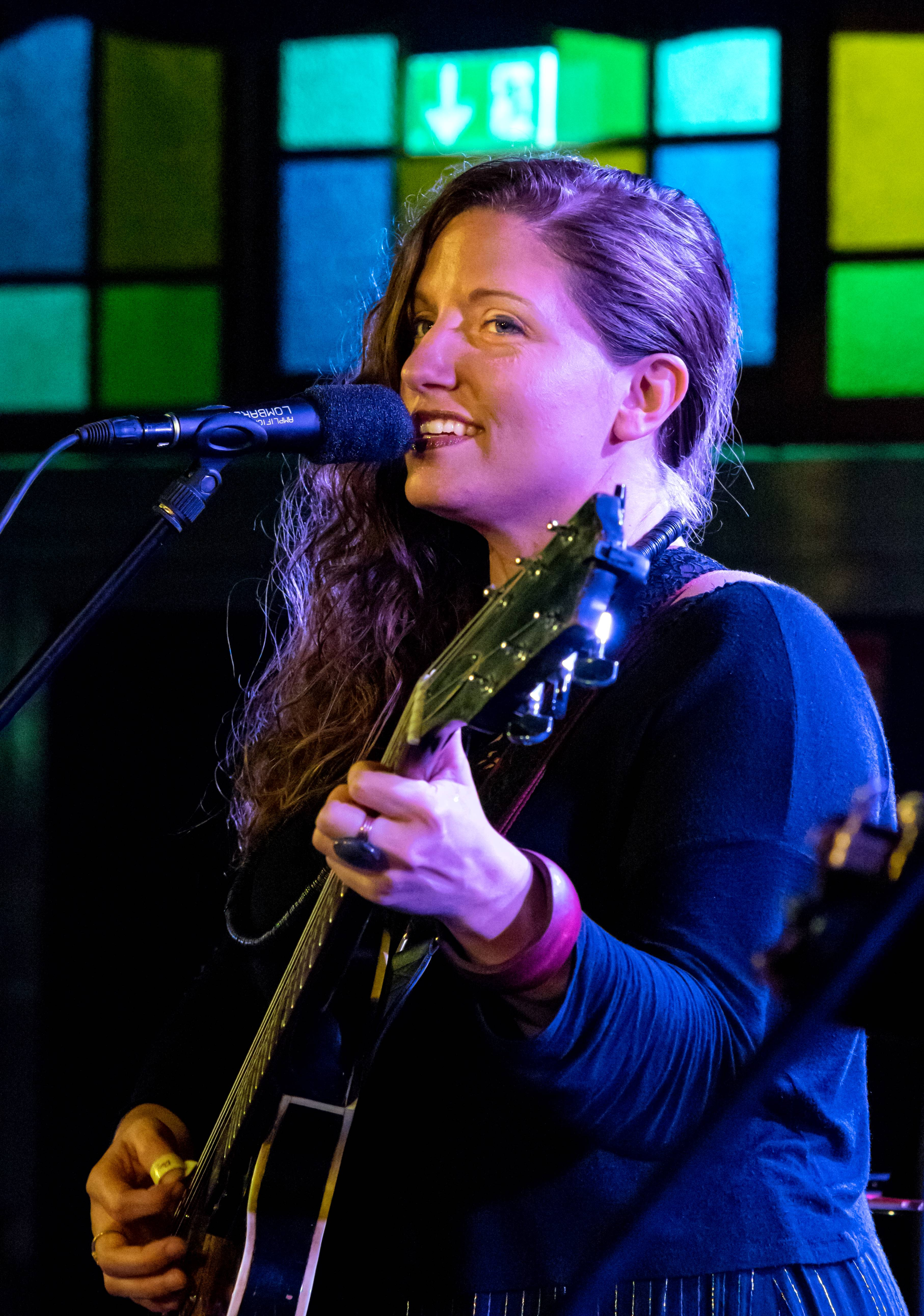 Bilder vom ZMF 2015 Jolie Holland am 12. 07. 2015